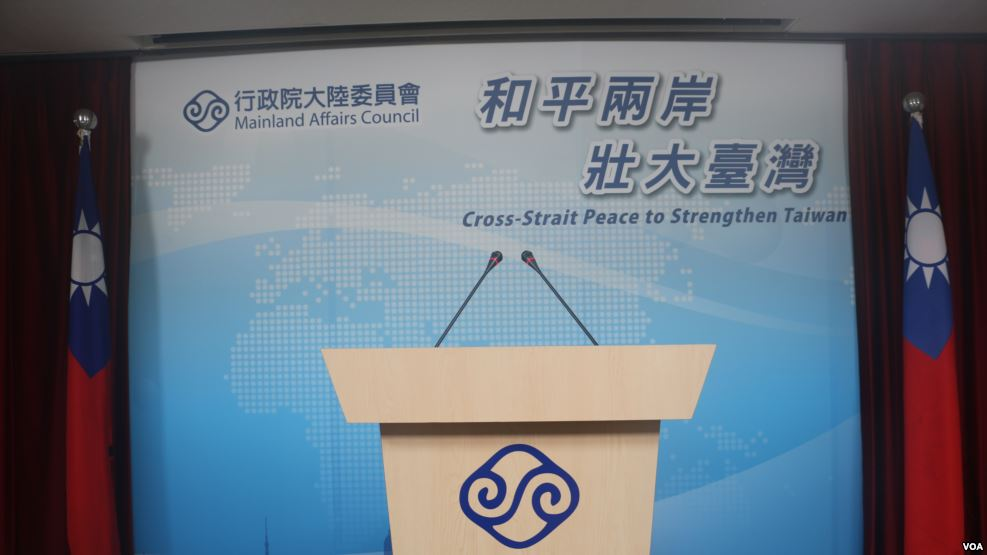 中華民國行政院大陸委員會記者會講桌。